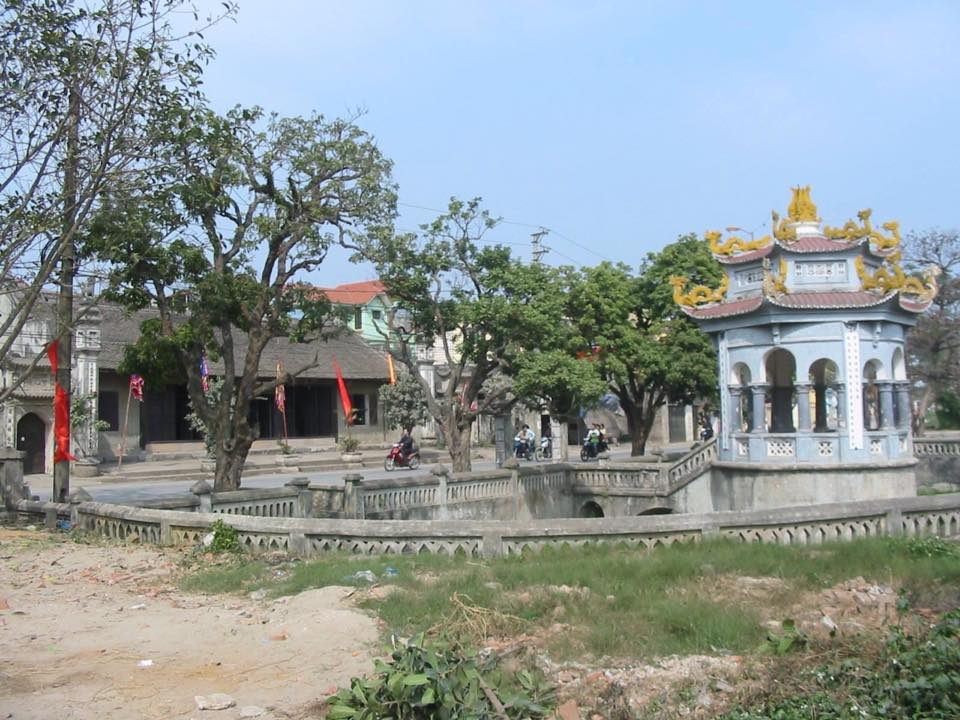 Nhà Thuỷ tạ trước đình thờ Danh nhân Chu Văn An ở xã Thanh Liệt đầu những năm 2000, trước khi bị phá